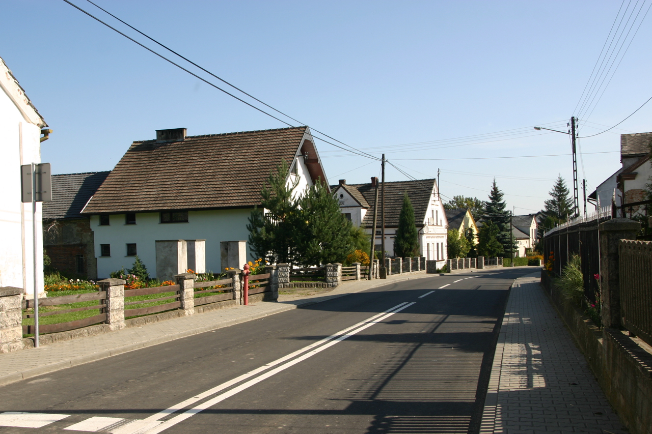 Rostkowice (dodatkowa nazwa w j. niem. Rosenberg) – wieś w Polsce położona w województwie opolskim, w powiecie prudnickim, w gminie Biała.